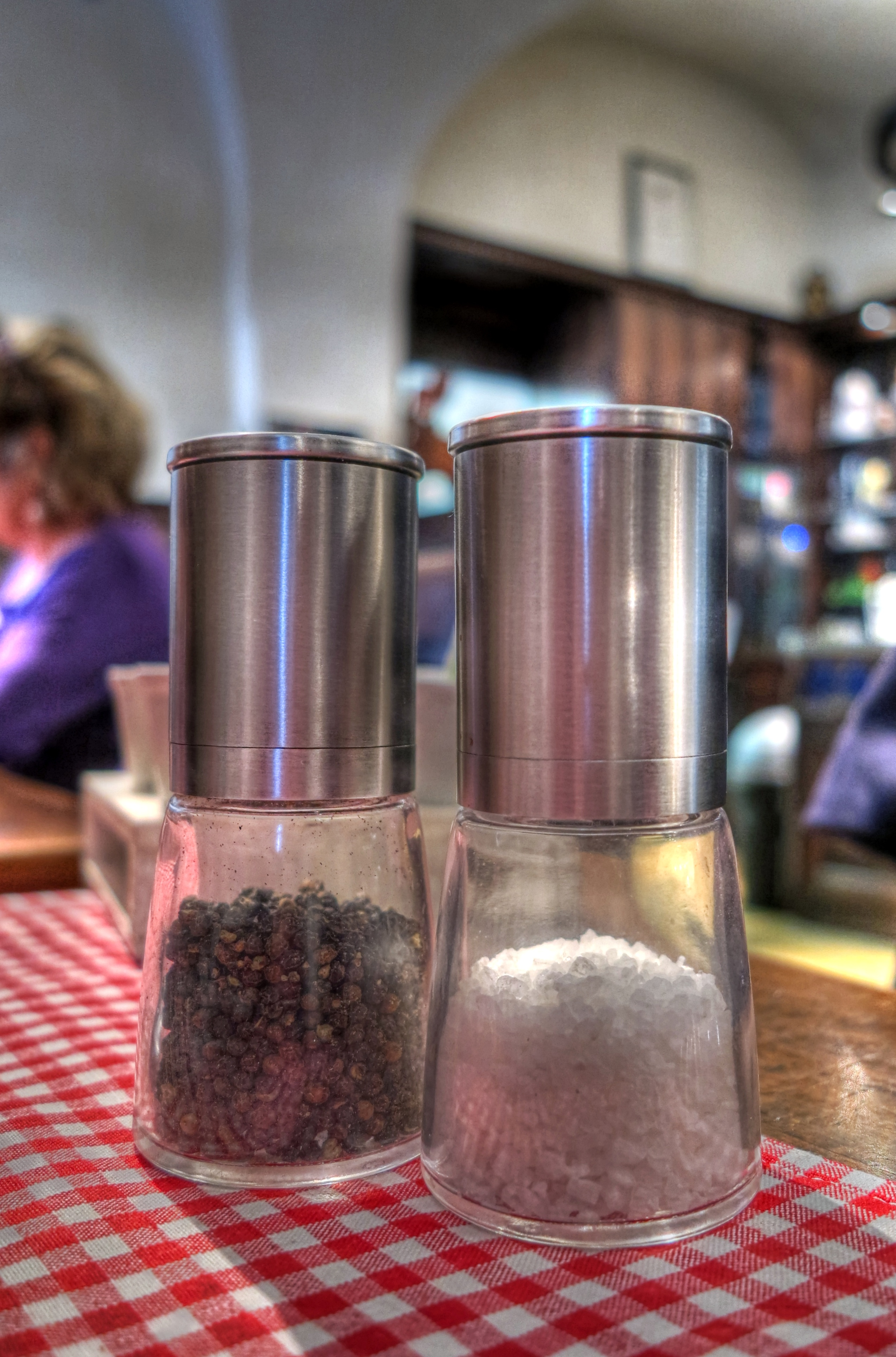 Pfeffer- und Salzmühle in der Bayrischen Gaststätte "Klosterstüberl" in Fürstenfeldbruck